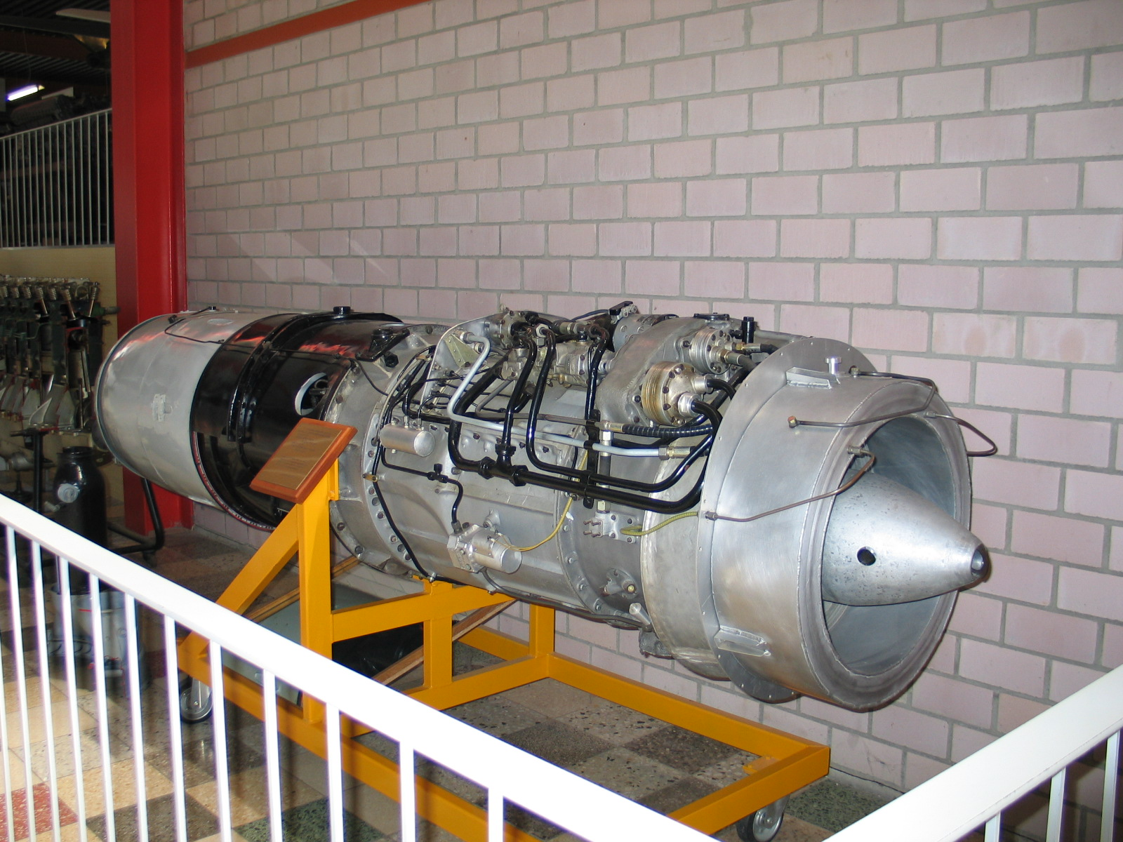 Jumo 004 - eigen foto